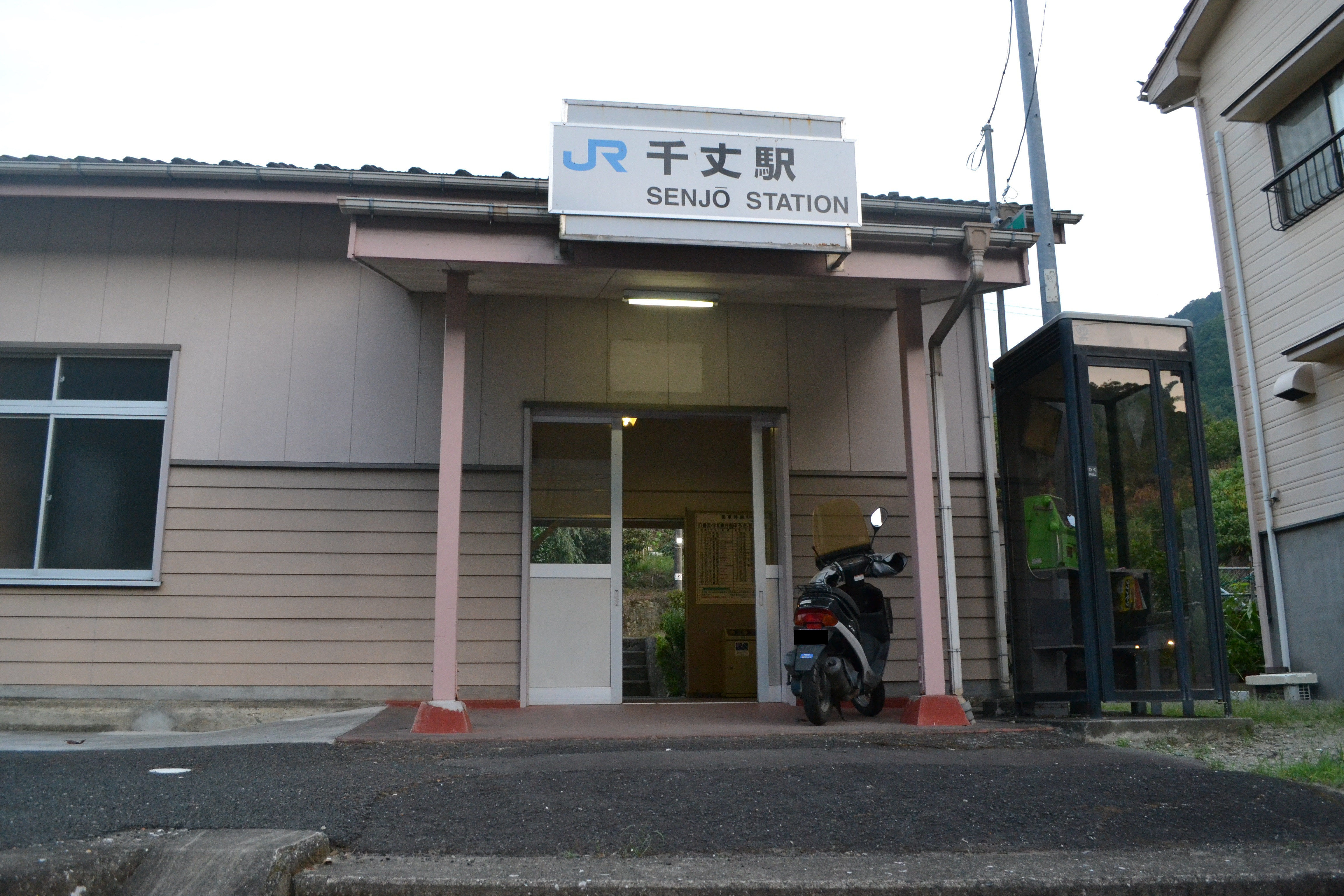 千丈駅駅舎。撮影日2013年08月12日